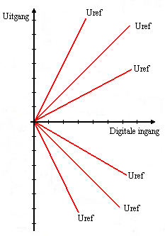 2 kwadrantenvermenigvuldiger. 2 kwadrantenvermenigvuldiger.